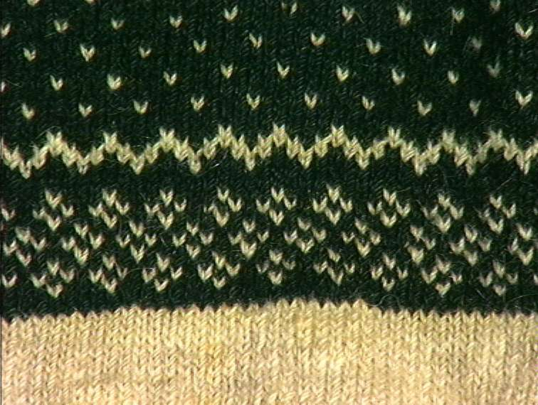 Lusekofte brukt i Bykle i Setesdal, Aust-Agder. Innkjøpt av Norsk Folkemuseum i 1911.